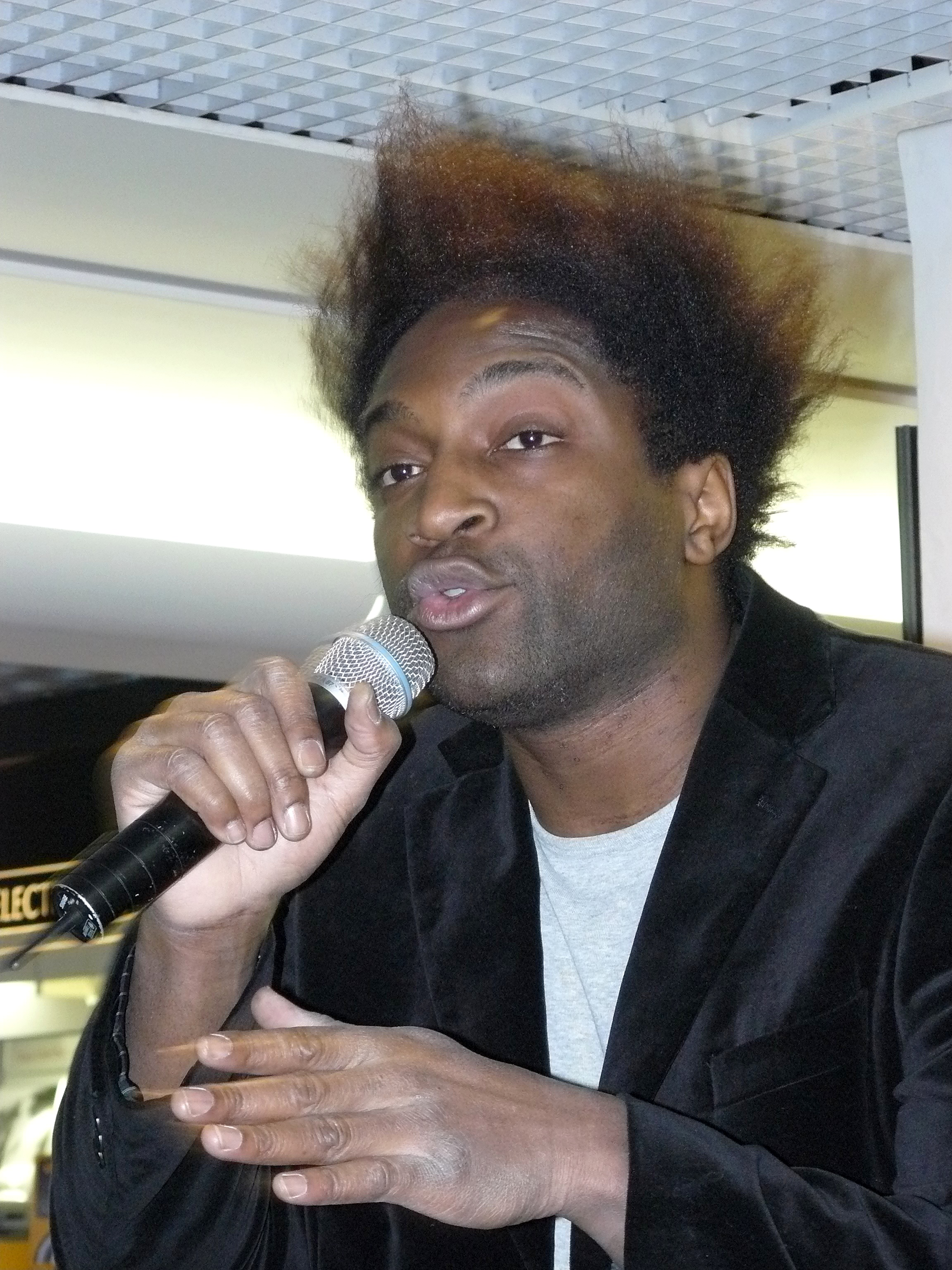 Kamini, rapeur français, le 24 février 2010, lors de la présentation de son deuxième album "Extraterrien" à la FNAC Forum.